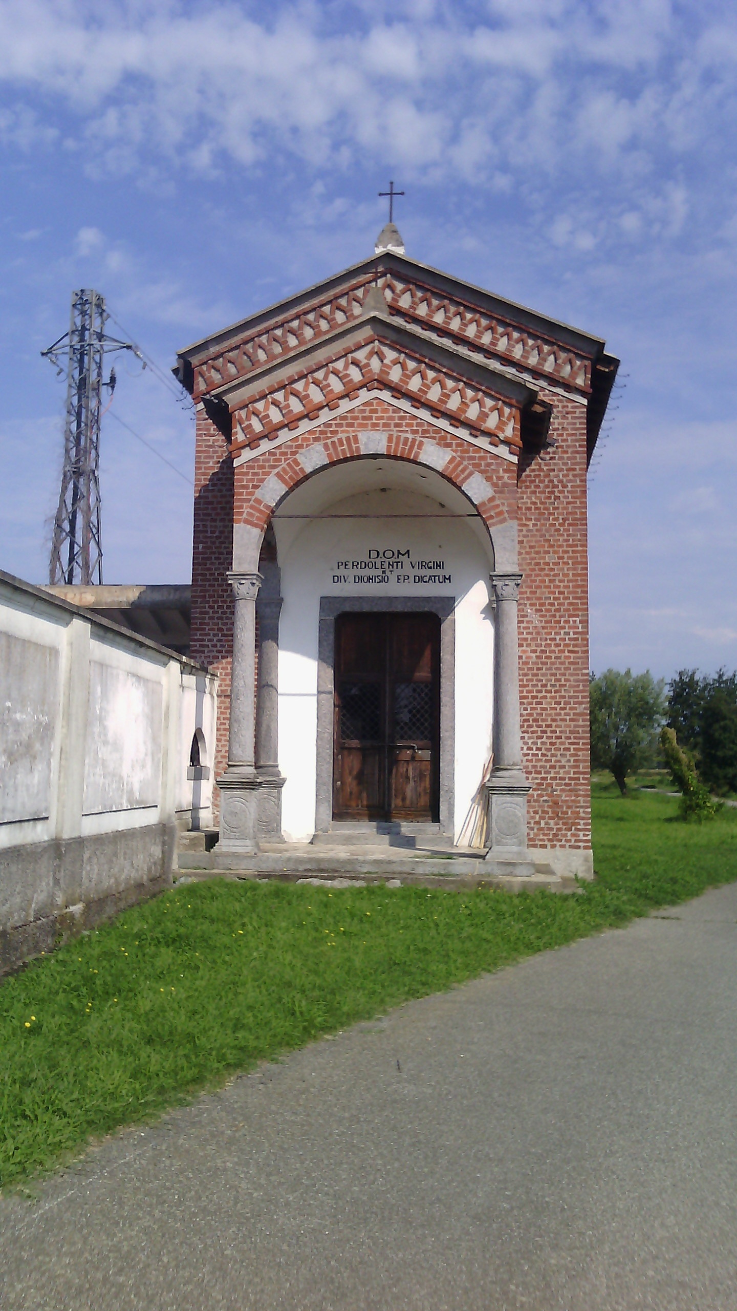 Oratorio di San Dionigi, San Vito, Gaggiano (MI)